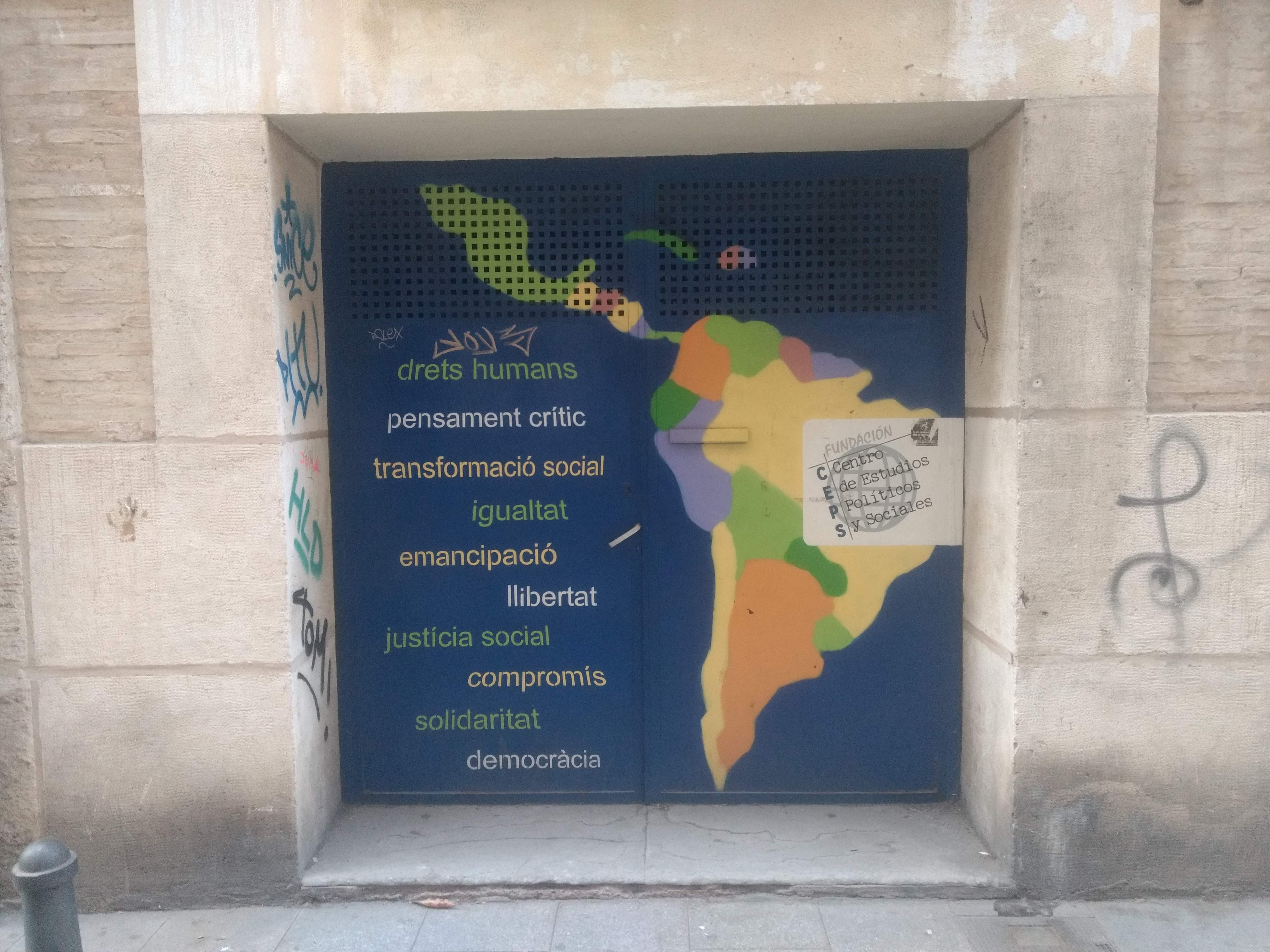 Seu del Centro de Estudios Políticos y Sociales, la coneguda com Fundació CEPS, a la Ciutat de València.